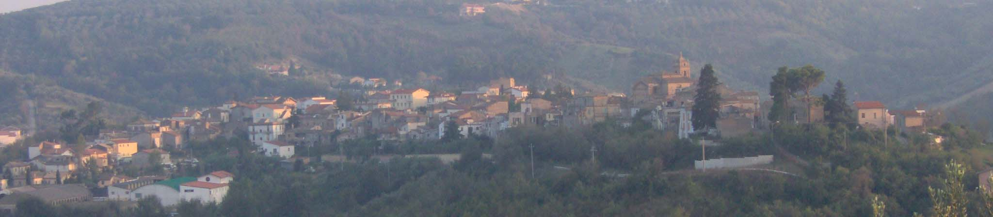 Una veduta di Picciano da Est. L'autore sono io e la fonte è la mia macchina fotografica digitale.